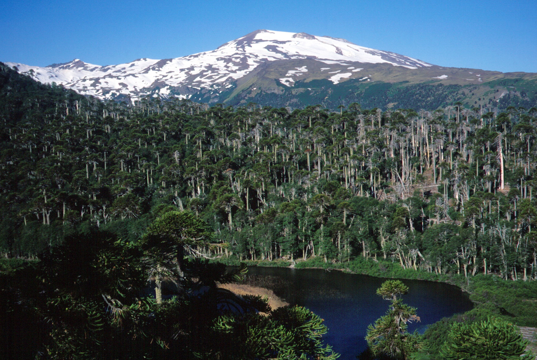 Copahue Volcano